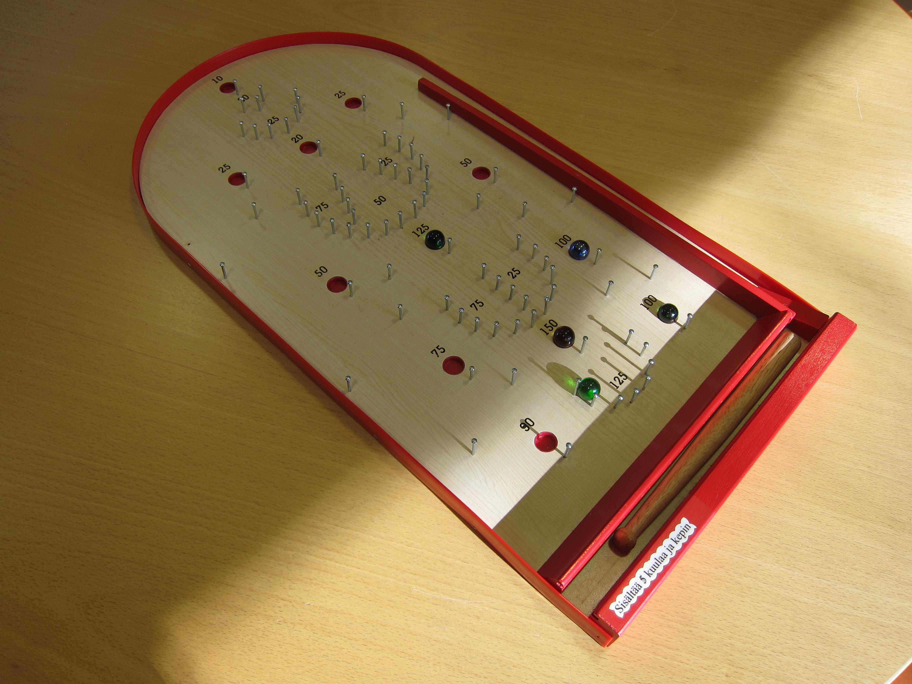 Fortuna-peli.